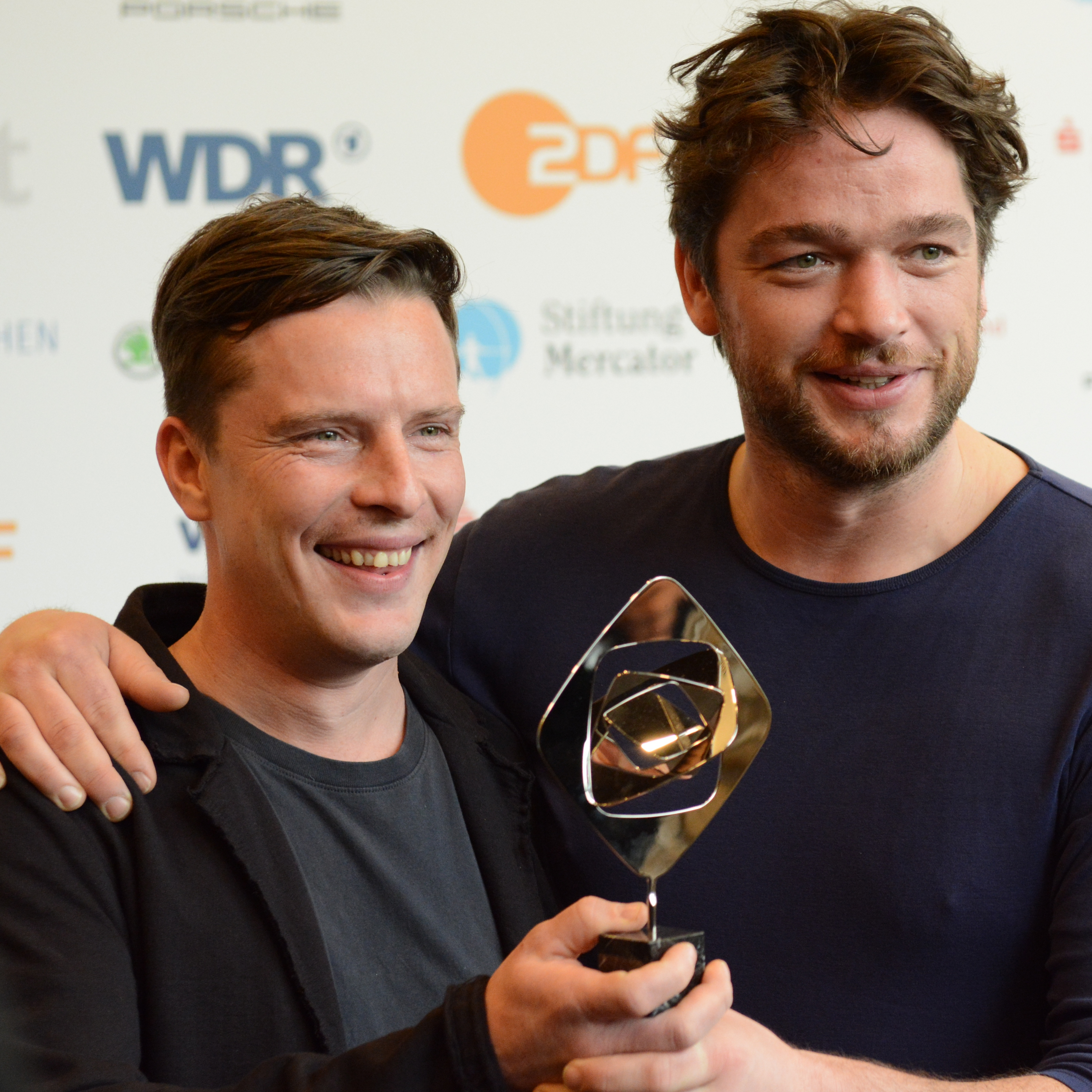 Florian Panzner, Ronald Zehrfeld bei der Verleihung des Grimme-Preises 2014.